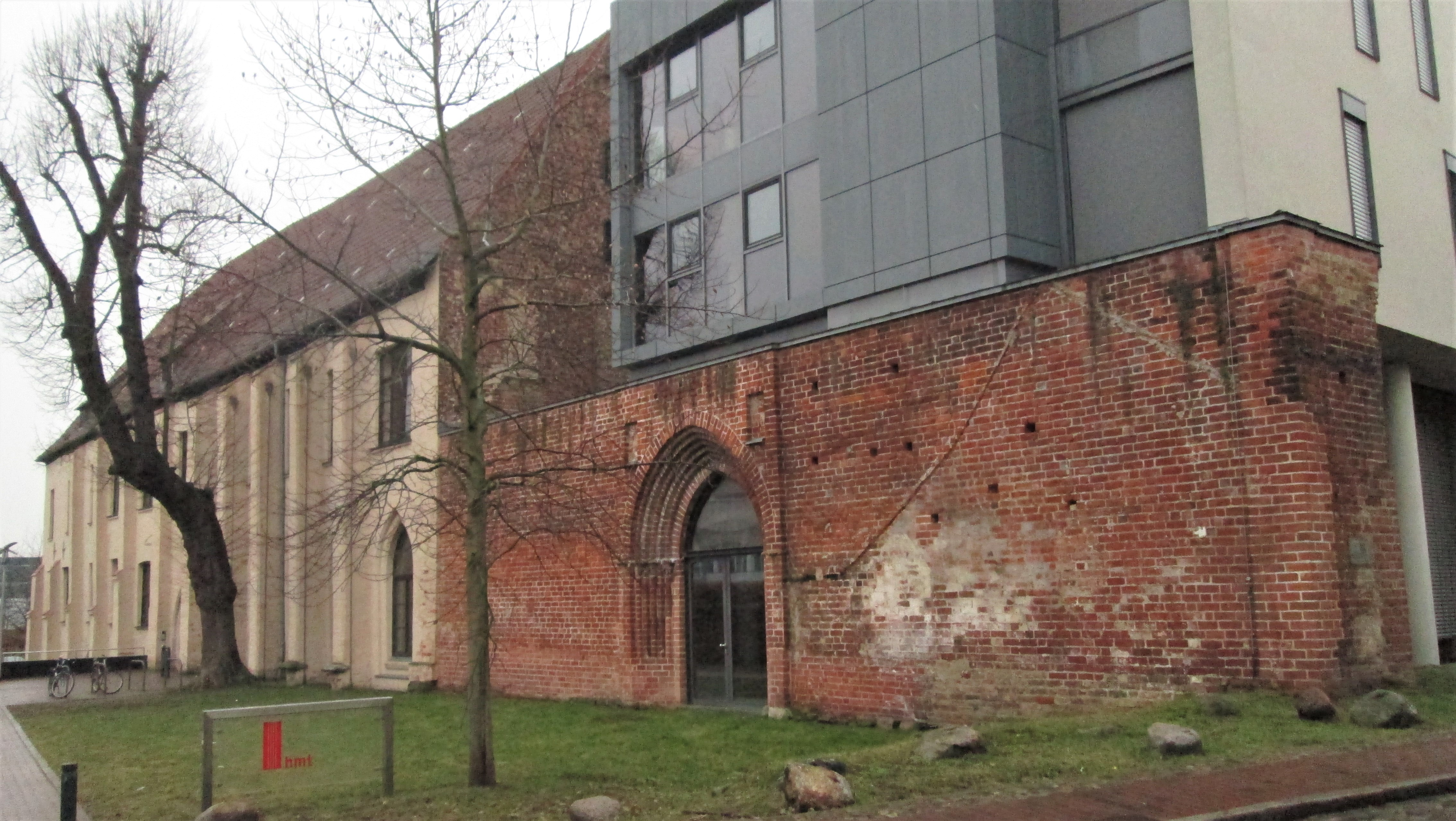 Hochschule für Musik und Theater Rostock - Blick von Westen mit dem Eingangsportal des Franziskanerklosters